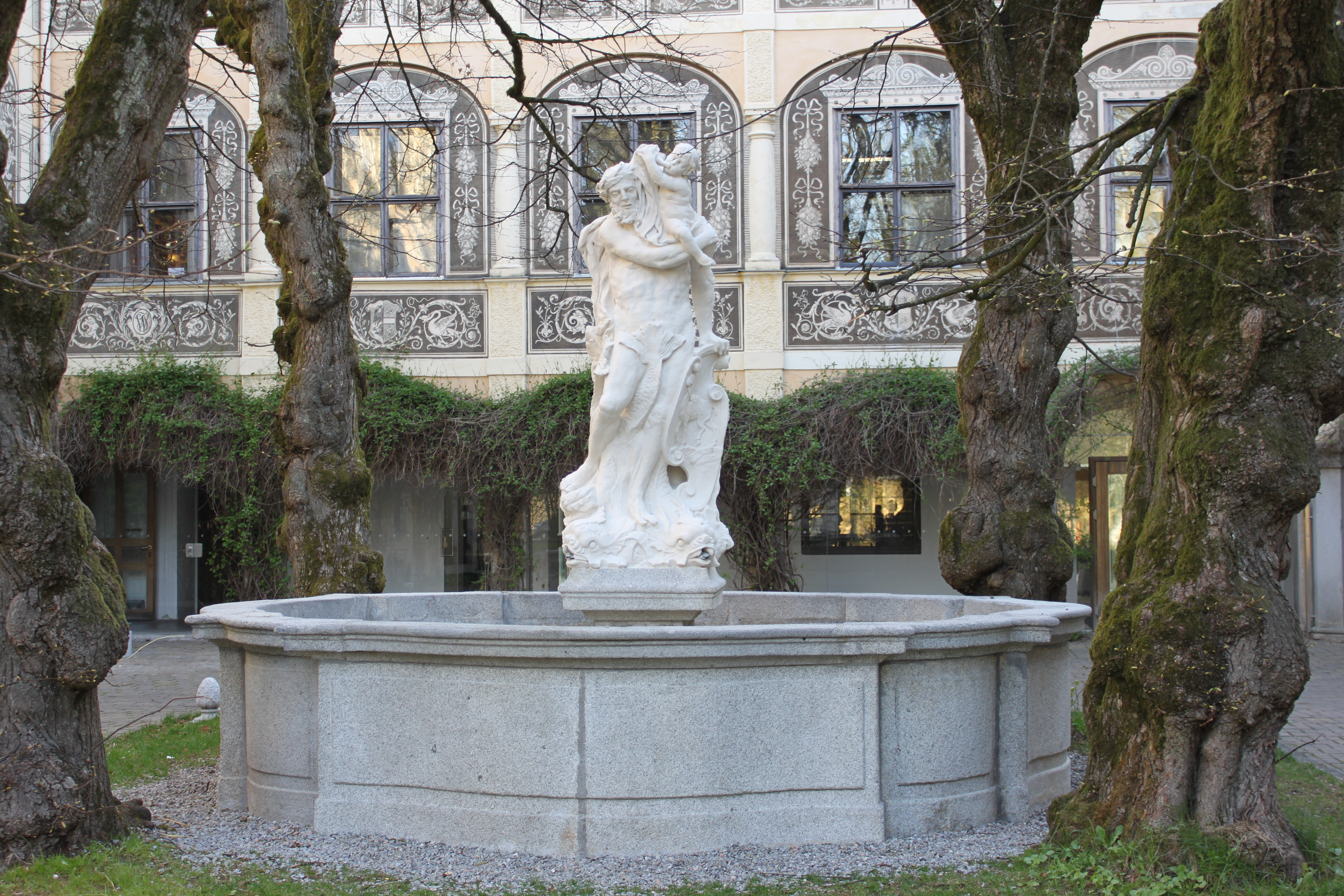 Bildungshaus Schloss Puchberg, Neptunbrunnen, aus 1740